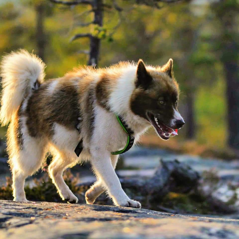 Perro de raza groenlandesa, son perro de tiro de trineo propios de Groenlandia.